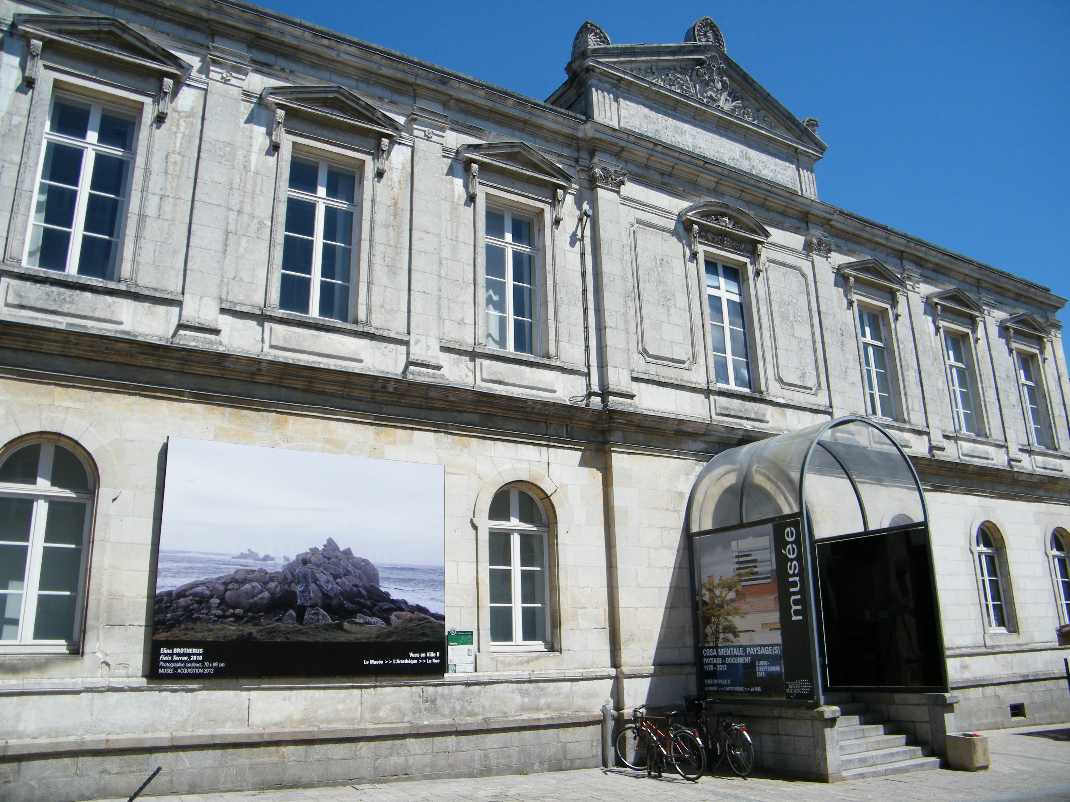 Musée de La Roche-sur-Yon